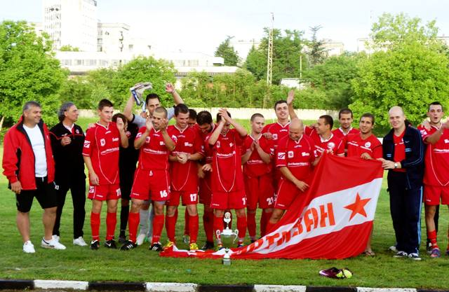 Отборът на Партизан (Червен бряг) носител на купата на БФС за спечелено 3-то място в Северозападната В група през сезон 2012/2013